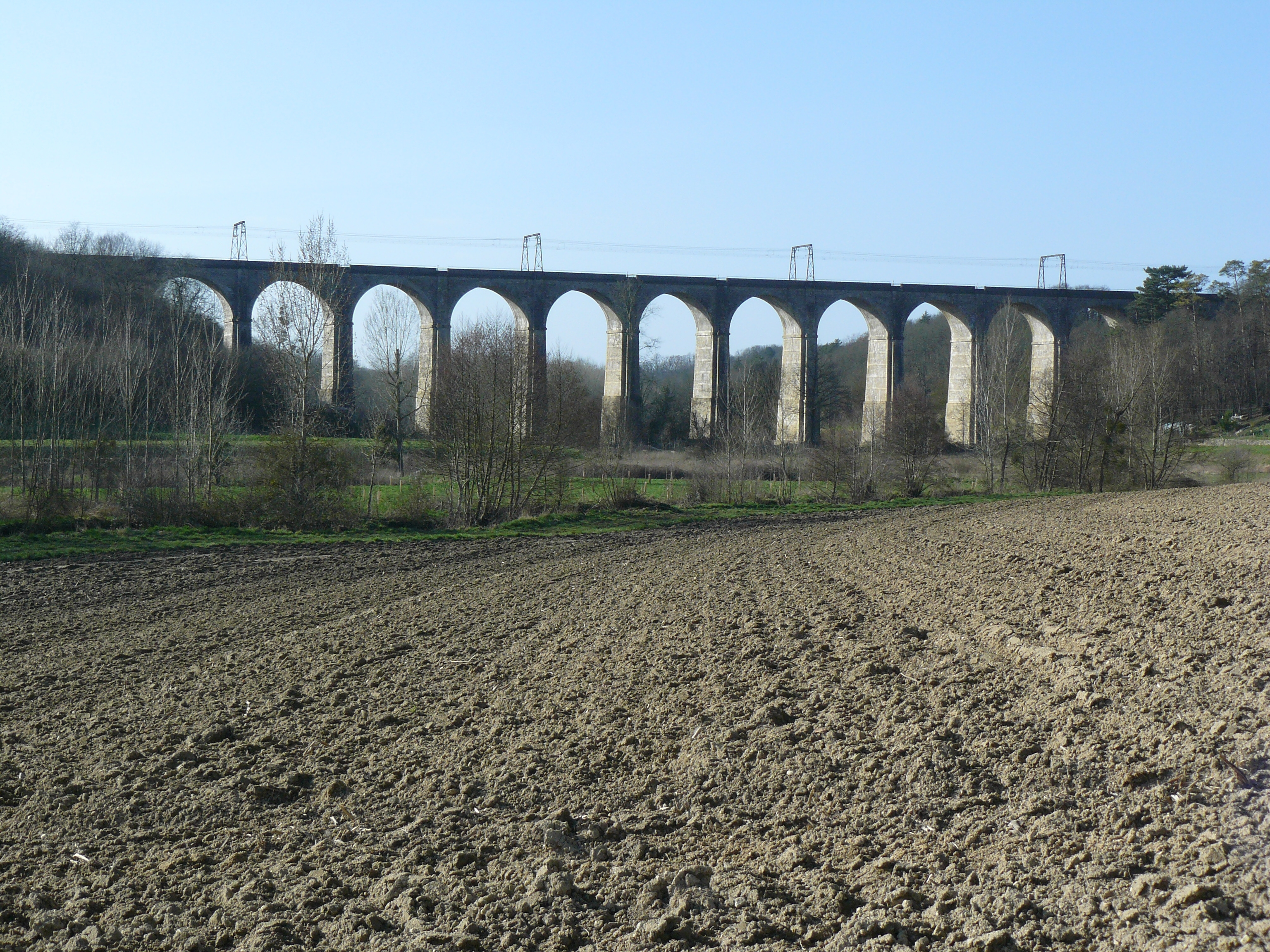 Viaduc de Besnault à Saint-Epain